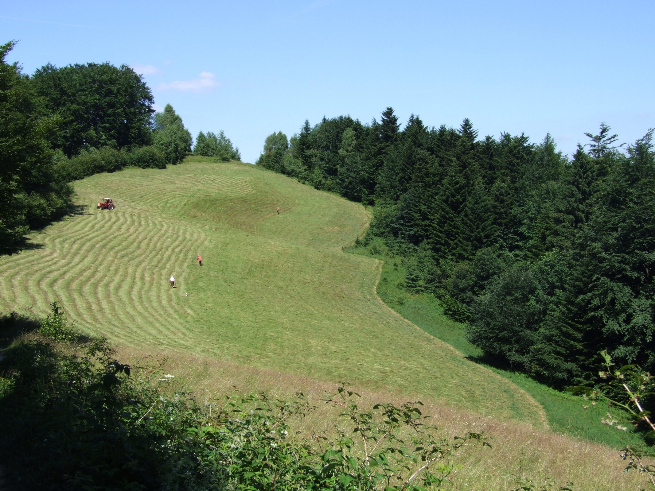 Sianokosy na południowej polanie pod wierzchołkiem Kordowca (2010 r.)